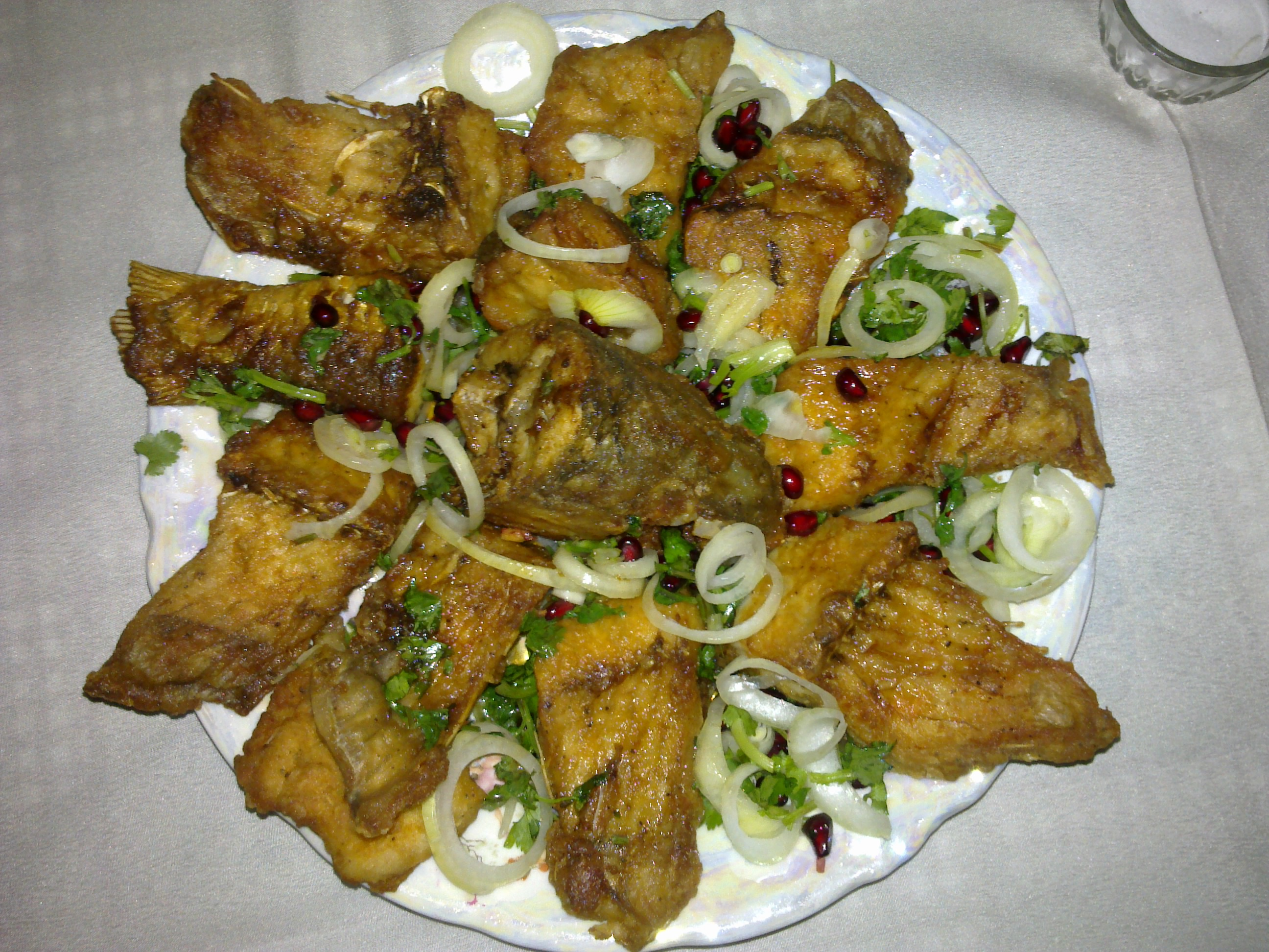 my work